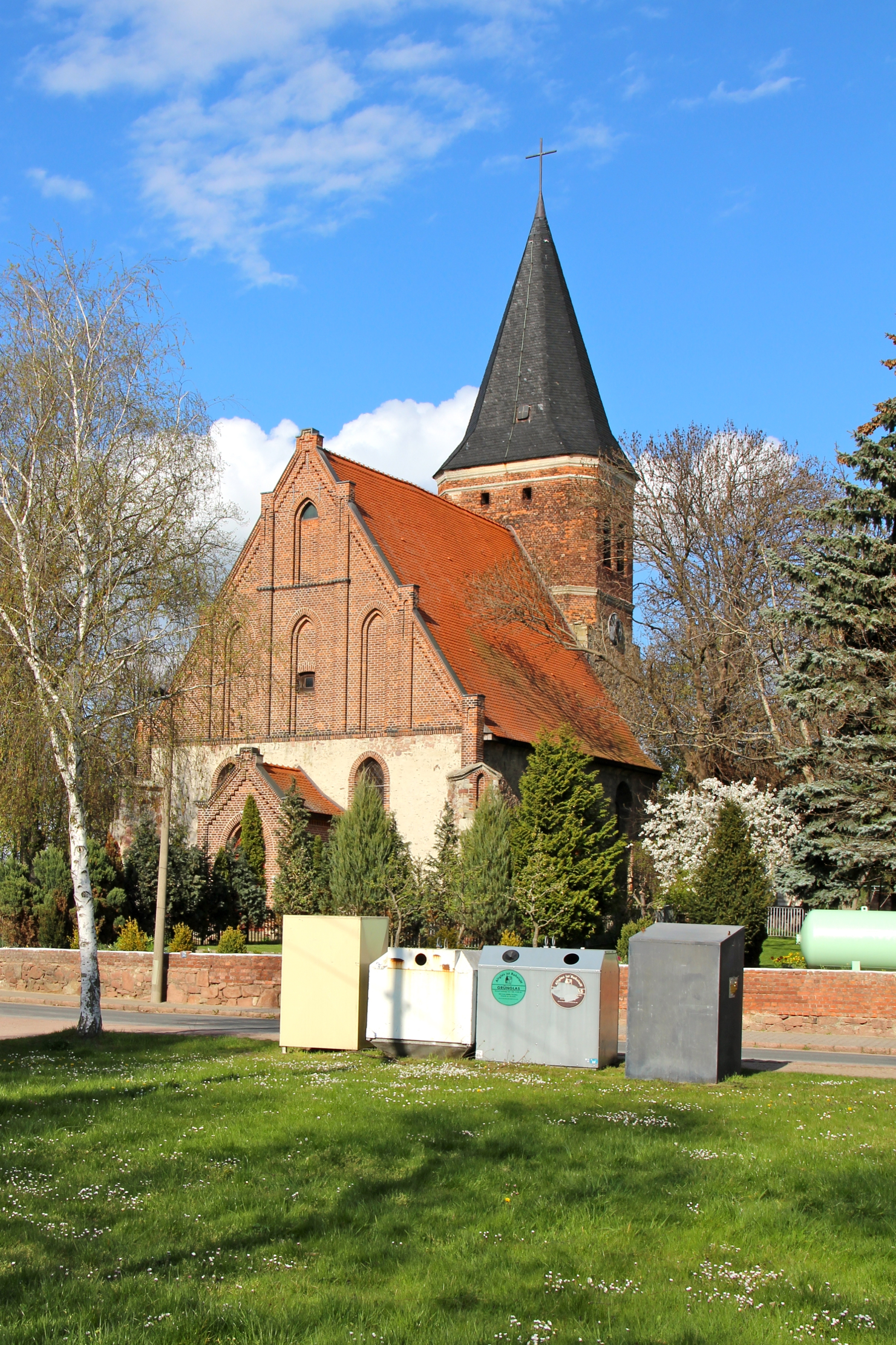 Prosigk ist ein Ortsteil der Gemeinde Südliches Anhalt in Sachsen-Anhalt, Deutschland.